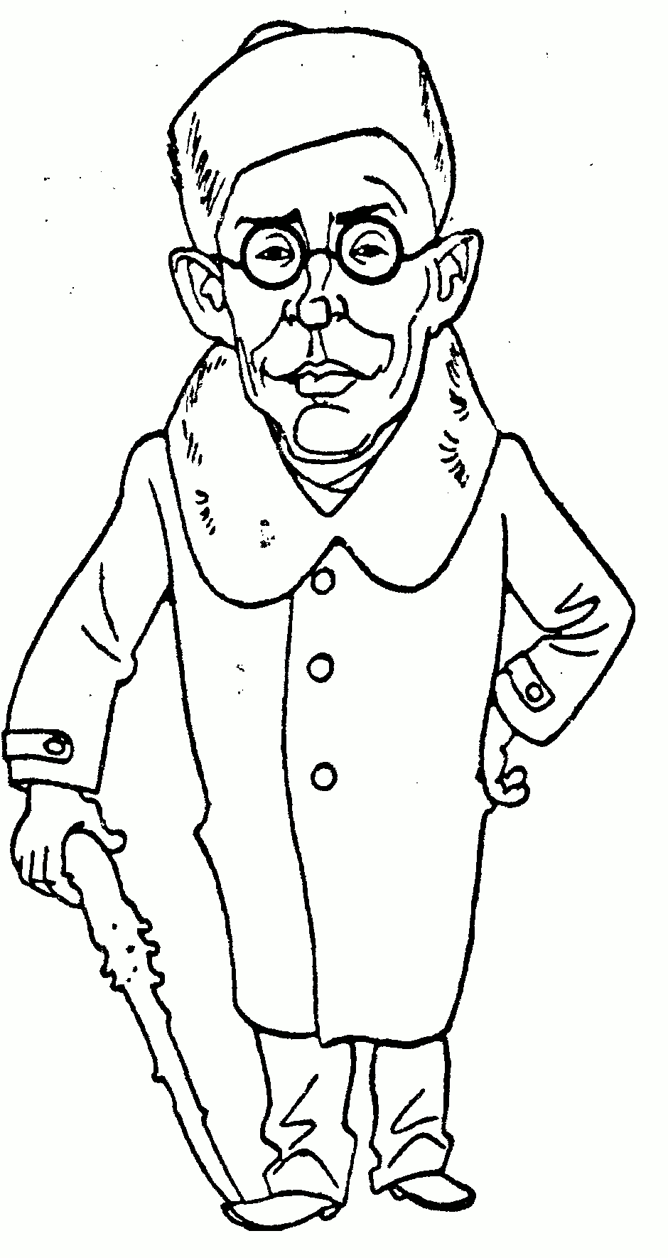 Kaikamees Boris Parm